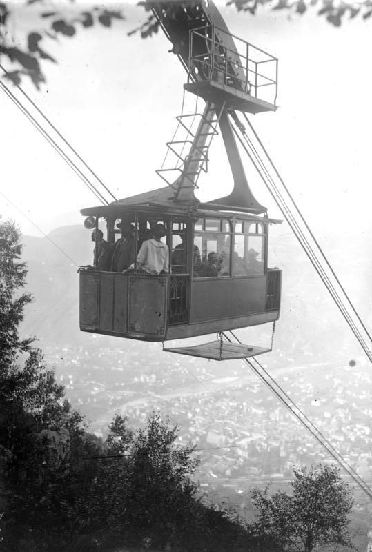 Die schönste Drahtseilbahn im ehemals deutschen Tirol befindet sich unweit der Stadt Bozen, jetzt Bolzano genannt. Die Bahn ist ein Werk deutscher Ingenieure. Die Baukosten betrugen über 1 Million Mark ! Blick auf einen Wagen der Bozener Drahtseilbahn in 1650 m Höhe. Tief unten die Stadt Bozen.